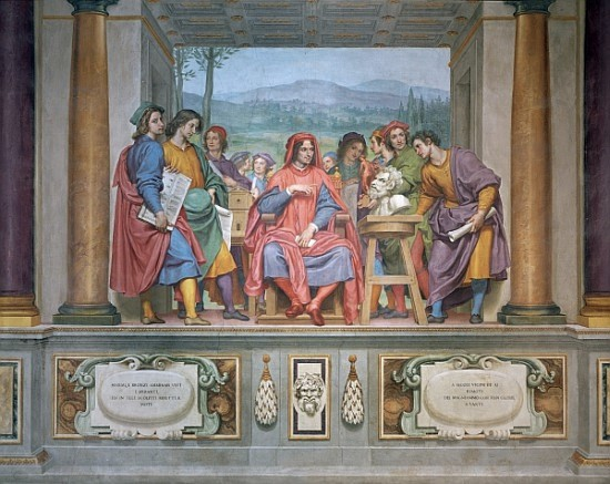 Lorenzo 'il Magnifico' (deutschː der Prächtige), umgeben von Künstlern begegnet Michelangelo im Skulpturengarten